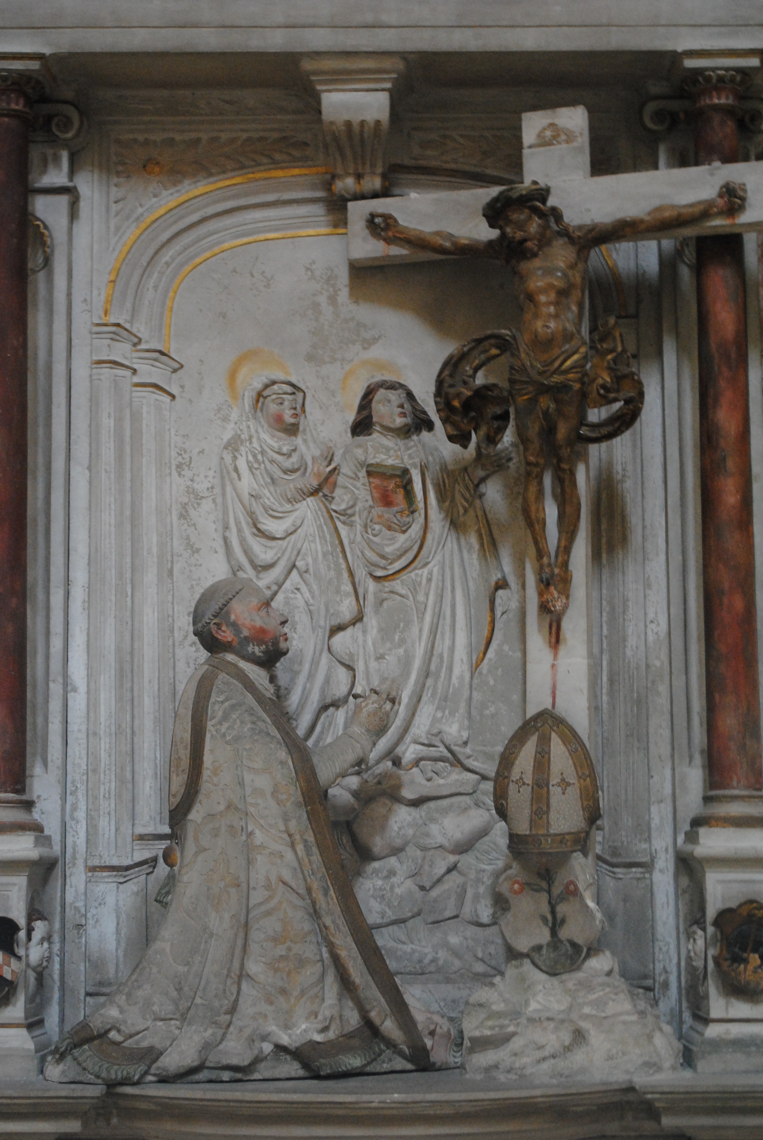 Epitaph des Abtes Leonard Rosen von Kloster Ebrach, Amtszeit 1563-1591